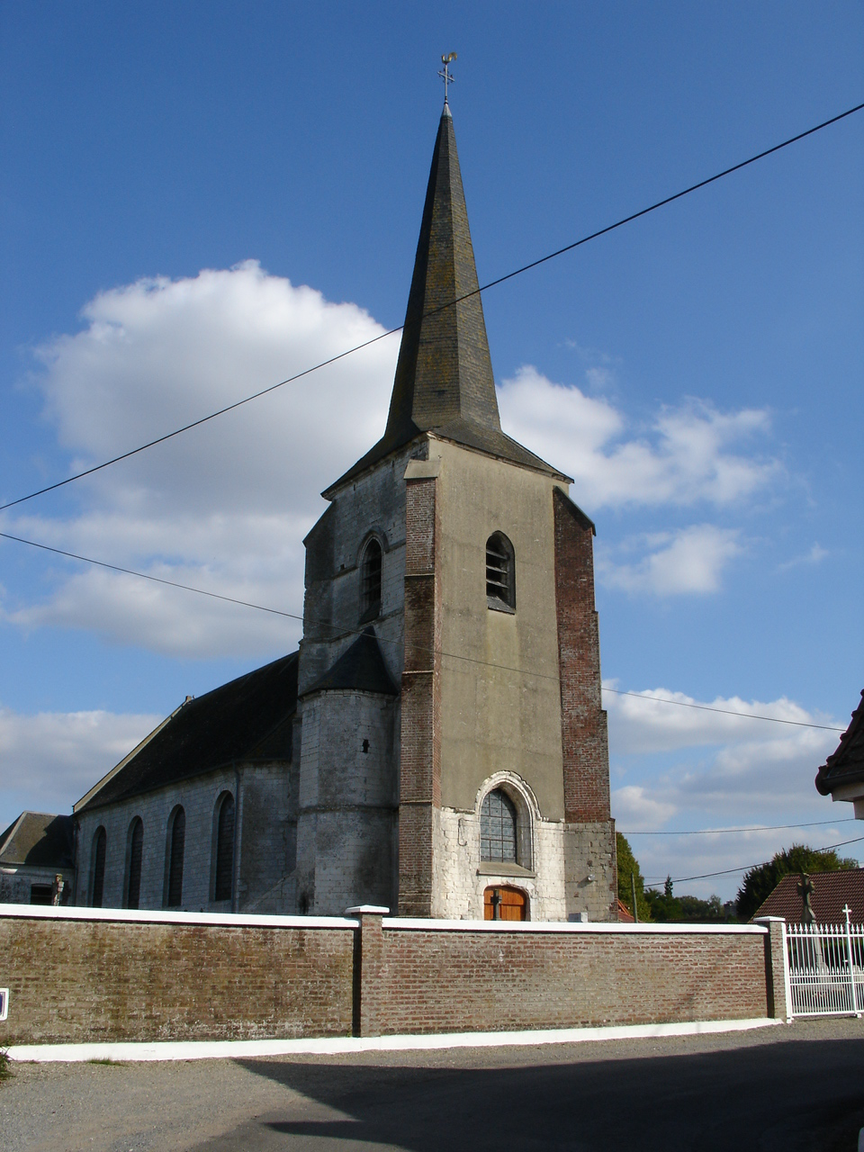 Église d'Erin